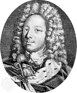 Gravure